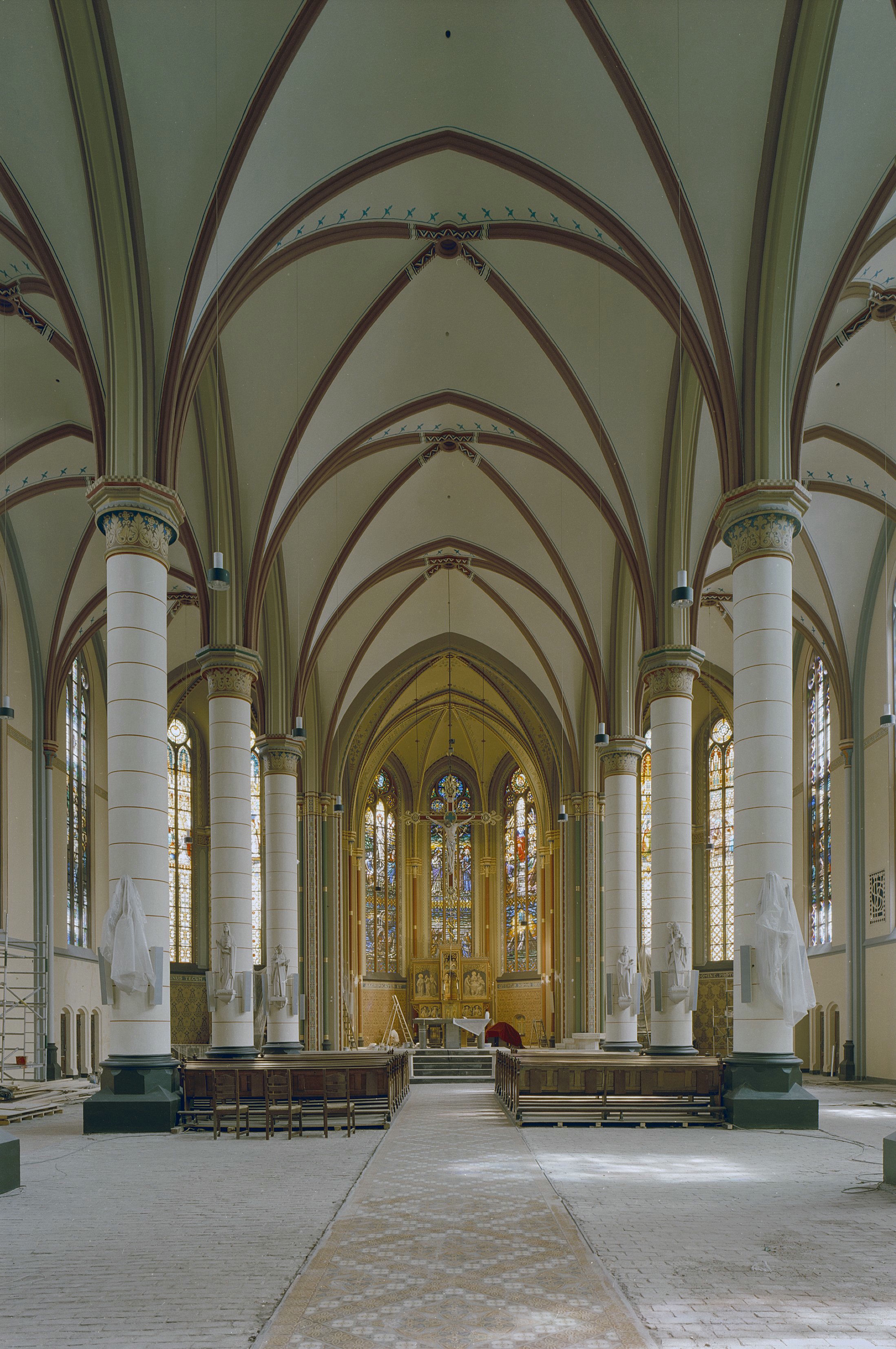 Sint Lambertuskerk: Interieur naar het oosten, muurschilderingen tijdens restauratie